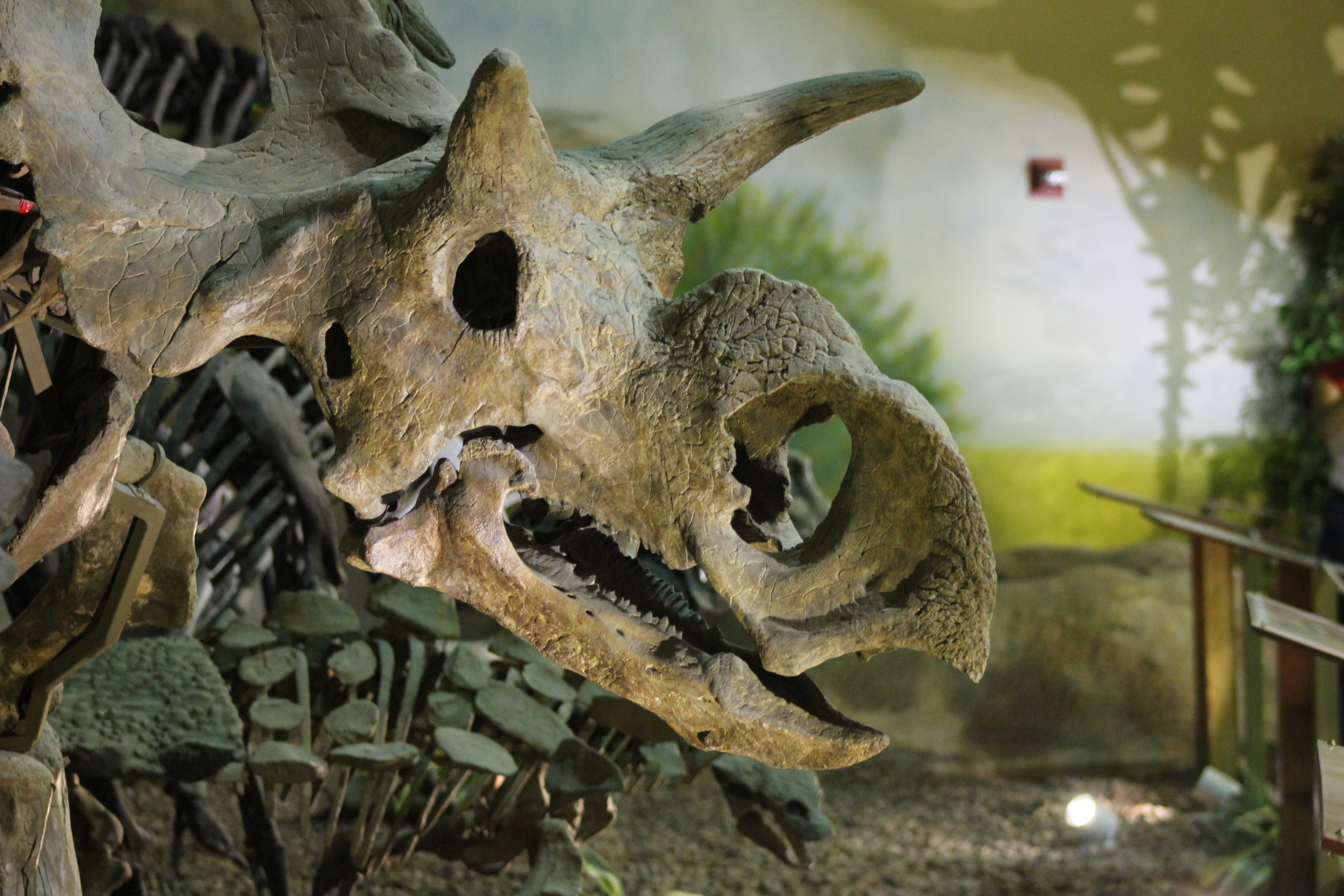 Wyoming Dinosaur Museum